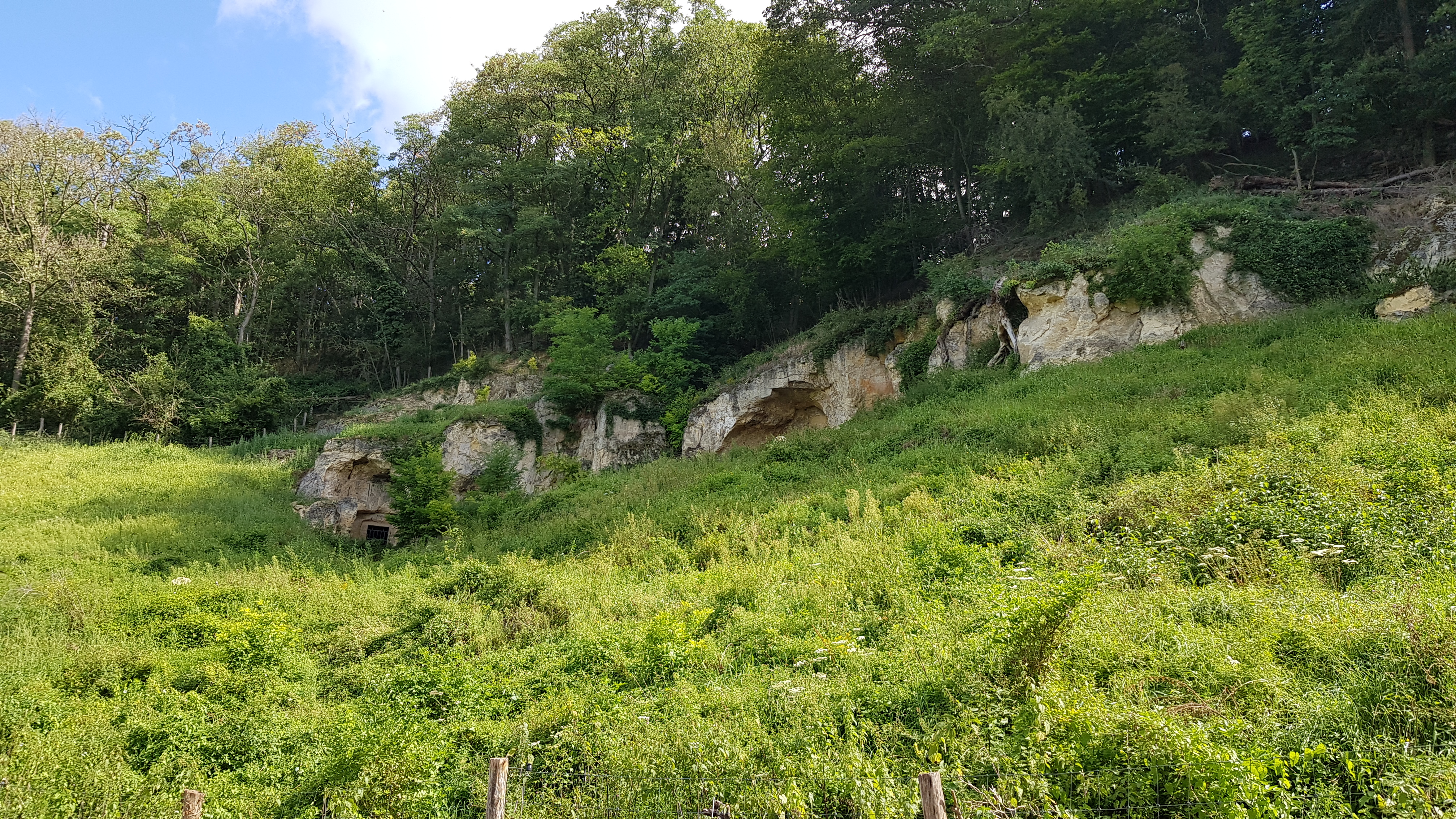 Mettenberggroeve I + II, Bemelen, Nederland